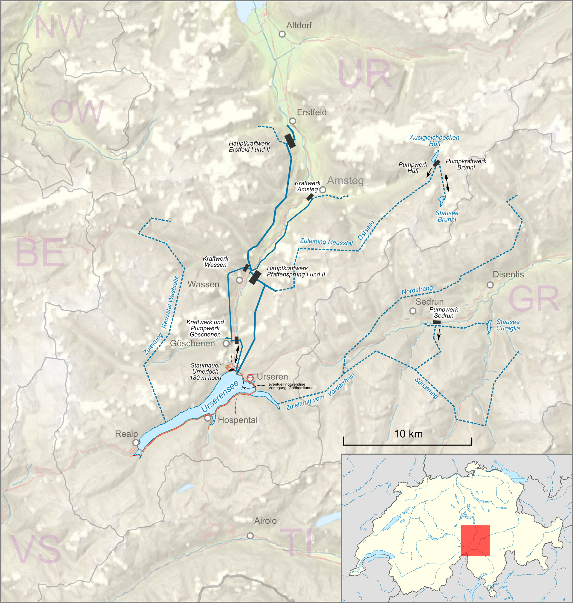 Lagekarte des Urserenkraftwerks – ein nicht realisierten Grossprojektes für eine Kraftwerkskaskade entlang der Reuss mit Stausee im Urserental.